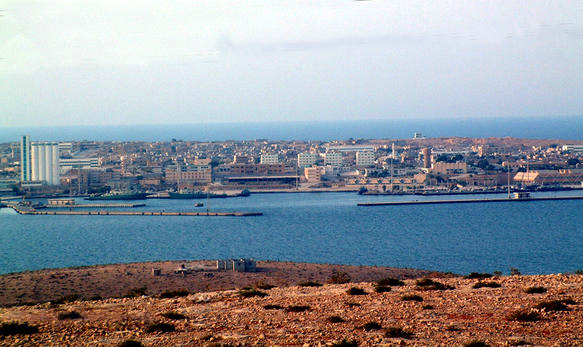 Porto di Tobruk (Libia)